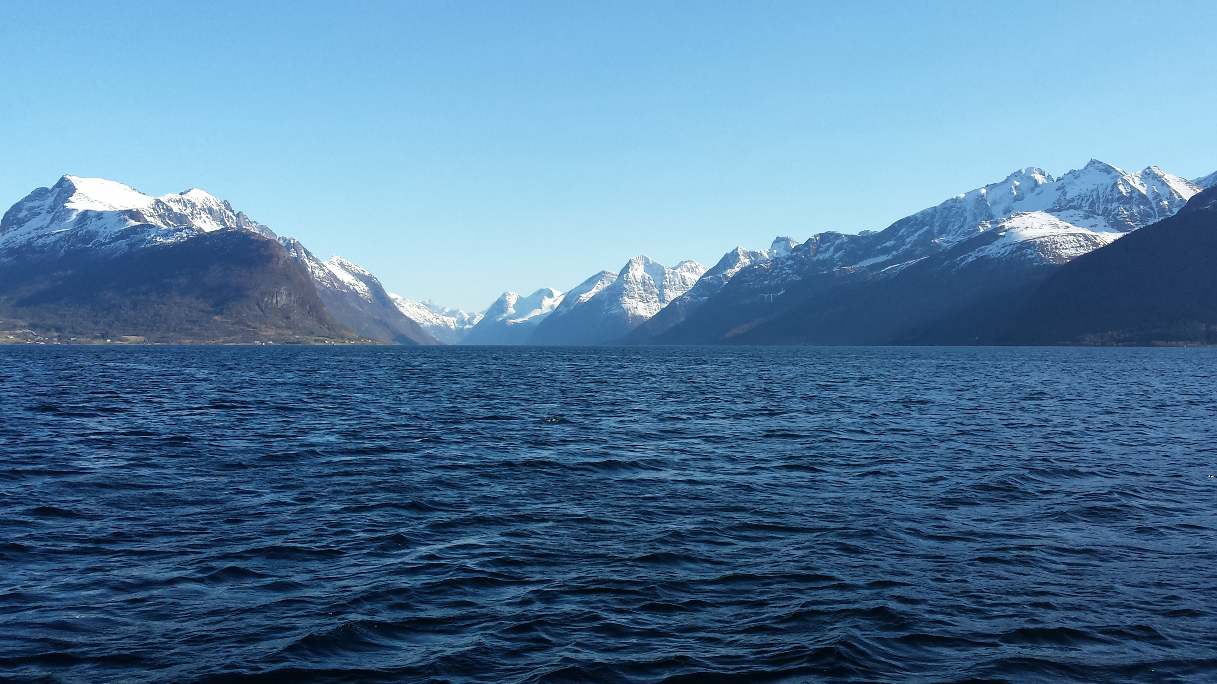 Hjørundfjorden fra nord.